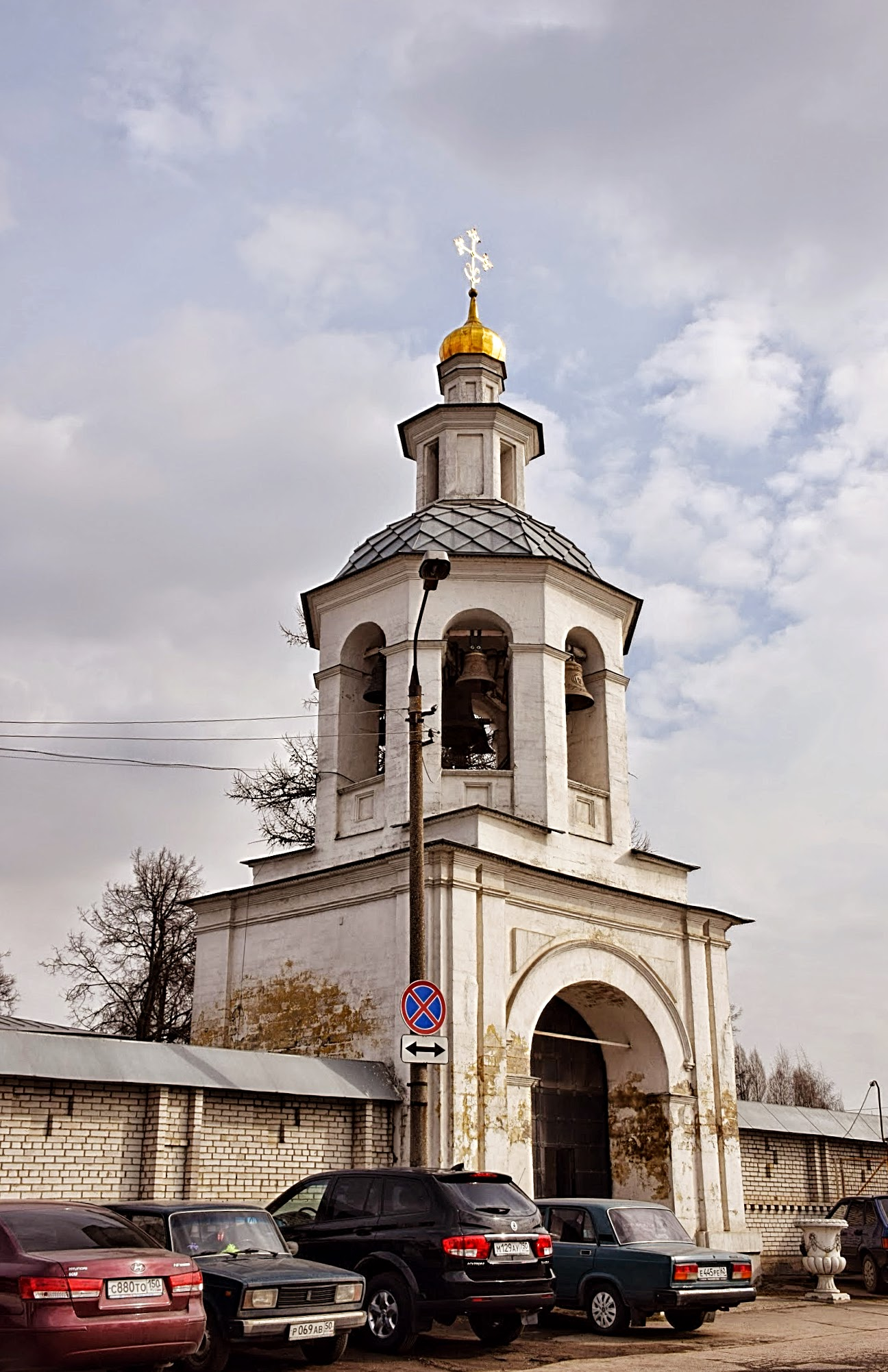 Колокольня надвратная: Белокаменное шоссе (с. Таболово), Видное, Ленинский район, Московская область